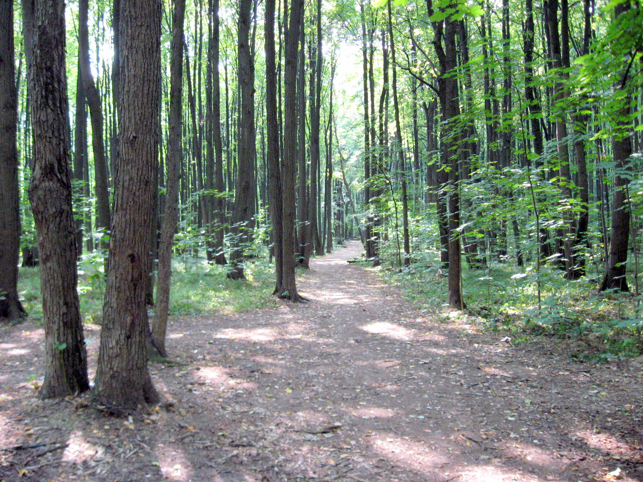 Характерная для Битцевского Лесопарка тропинка